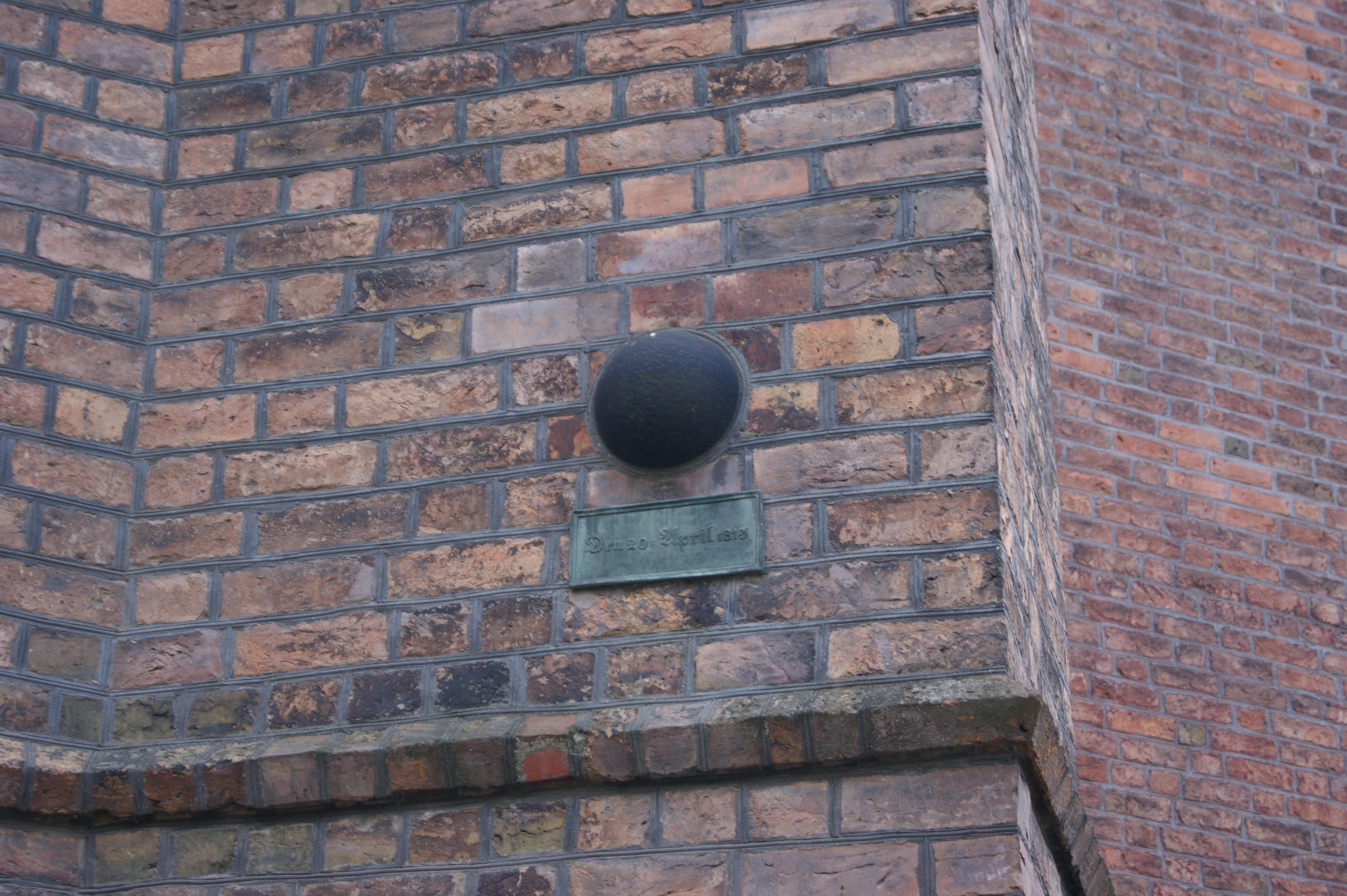 Kanonenkugel an der Nordseite der Kirche